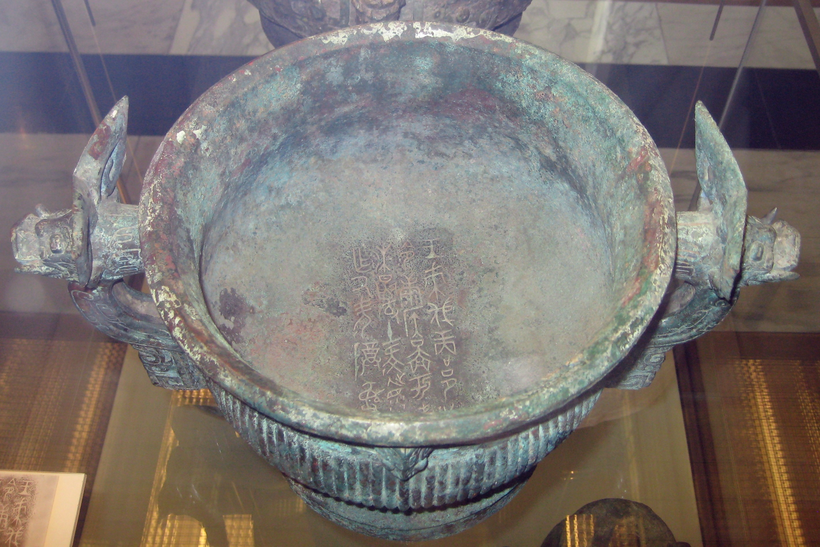 gui